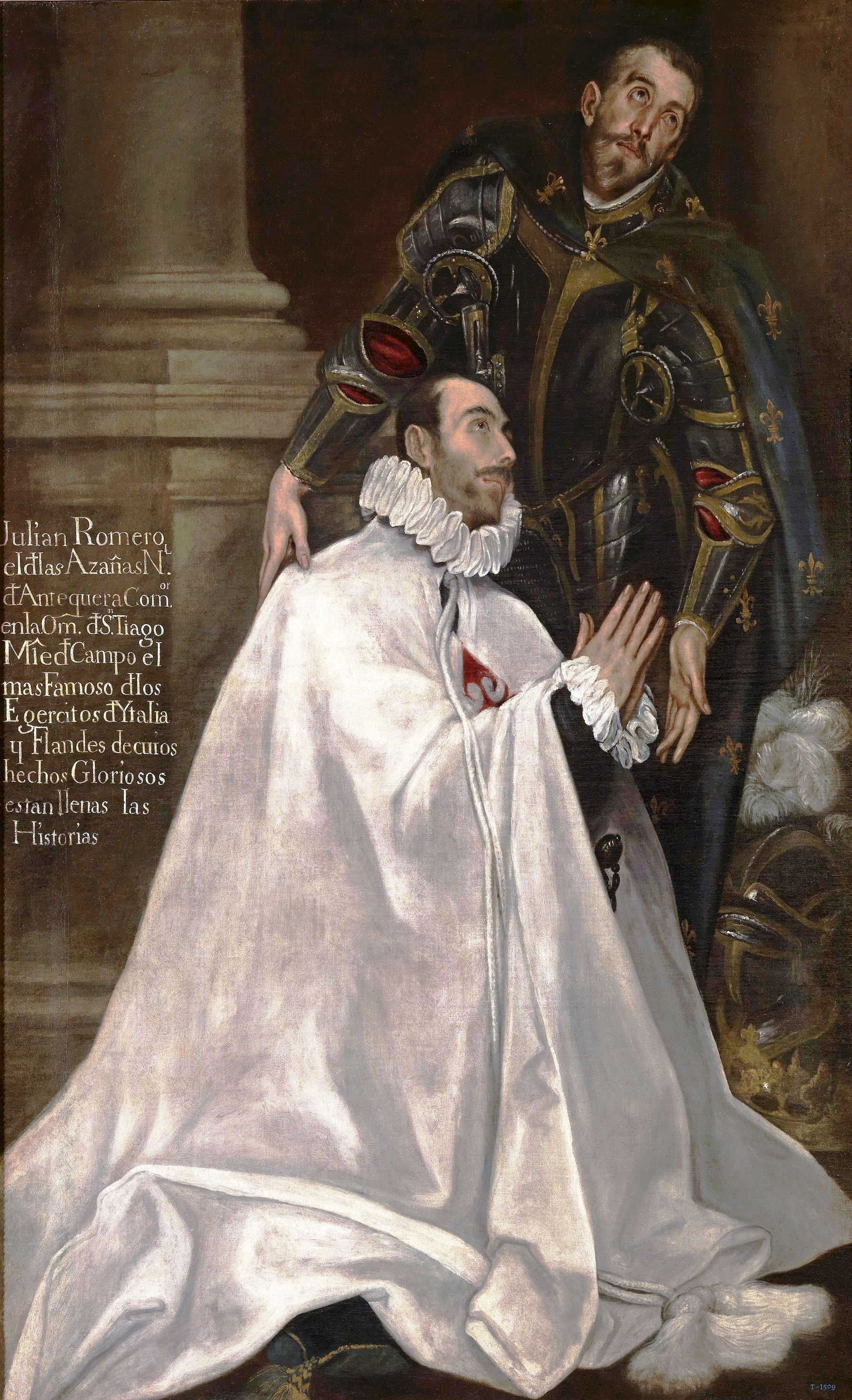 La obra representa al militar español Julián Romero (1518-1577), que aparece de rodillas y con el manto blanco capitular de caballero de la Orden de Santiago, junto a su patrono, San Julián, que aparece de pie y con armadura.